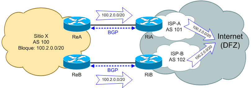 Figura usada en Multihoming Autor: Usuario:Barcex Licencia: GFDL y cc-by-sa-2.5